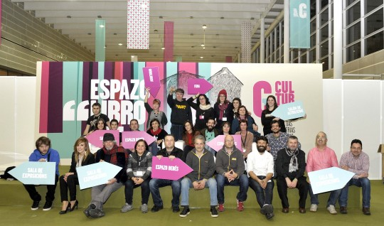 Equipo humano do Culturgal 2014